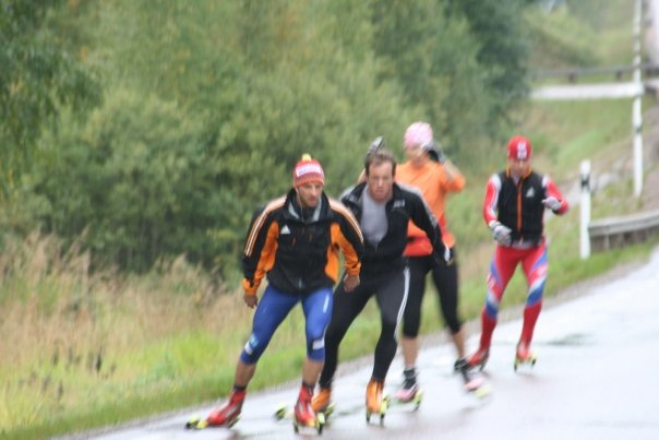 See Title